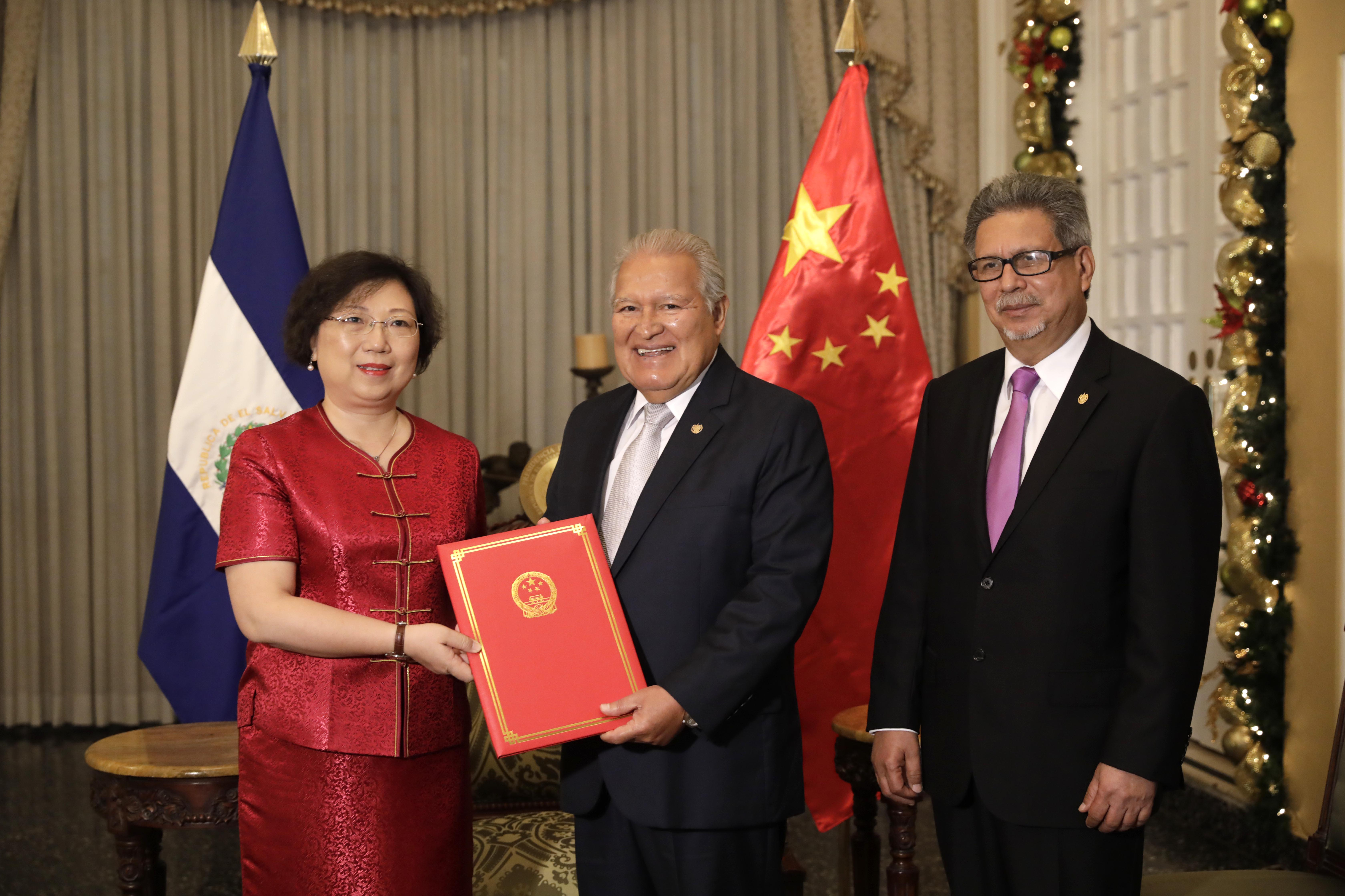 Entrega de cartas Credenciales, Embajadora de China, Ou Jianhong